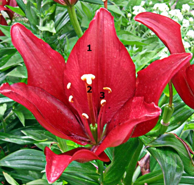 аутор Снежана Трифуновић Цвет